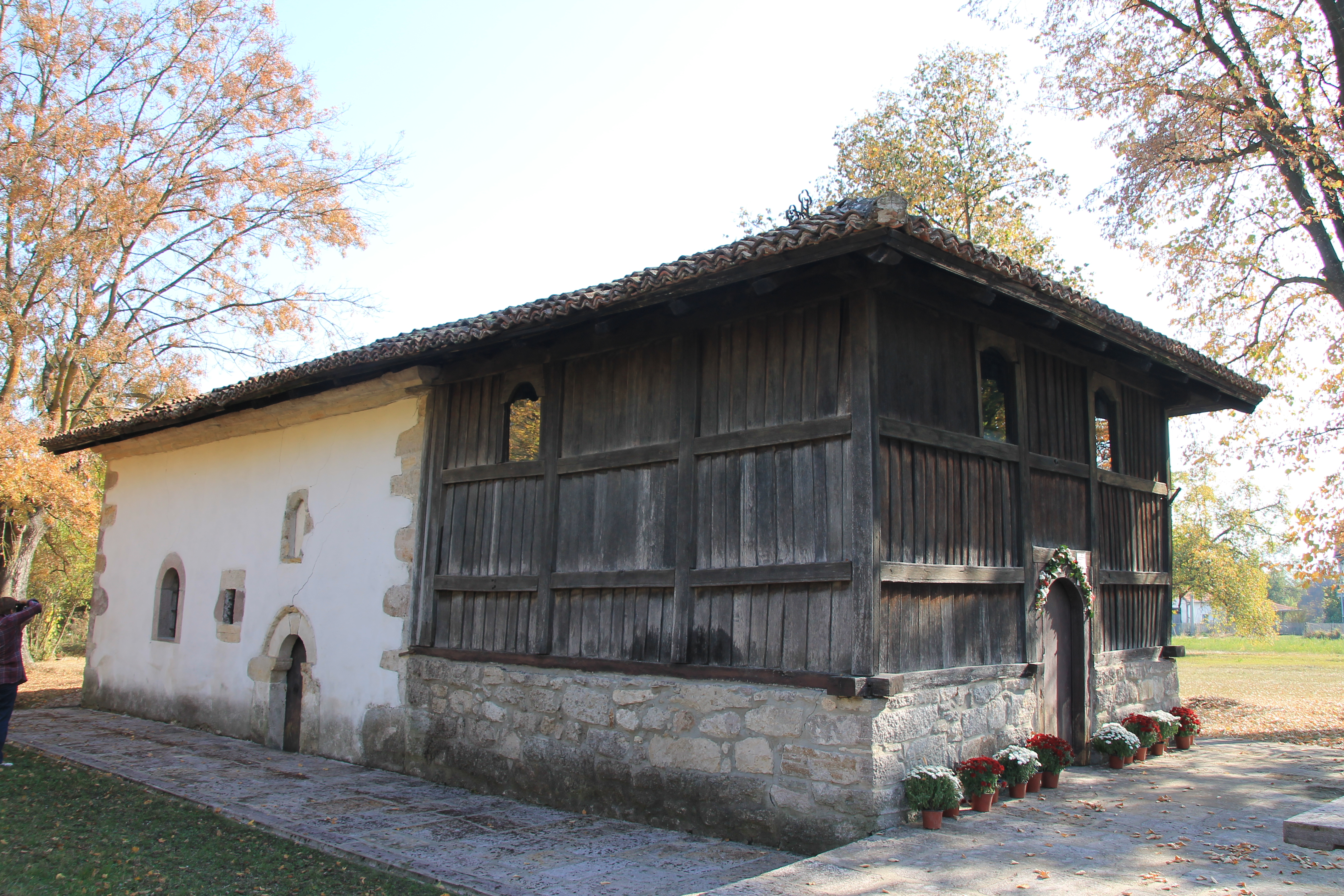 Crkva Pokrova Presvete Bogorodice (Bresnica)